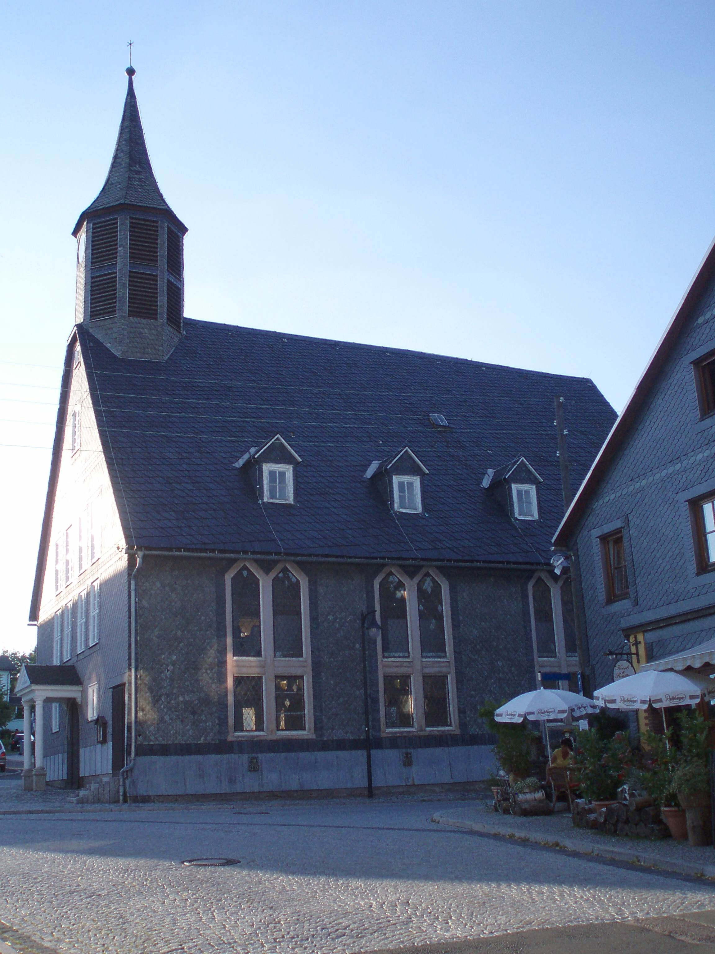 Kirche in Schmiedefeld am Rennsteig